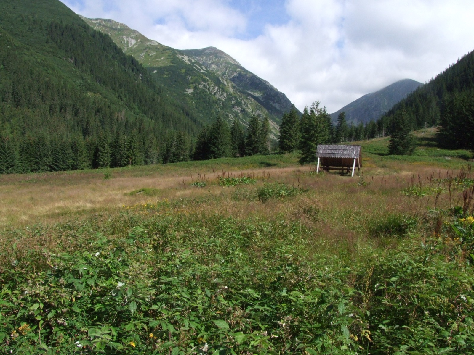 Polana Ostrzyca (Dolina Raczkowa,Tatry Zachodnie)